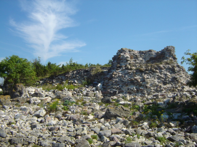 Virtstu piiskopilinnuse varemed